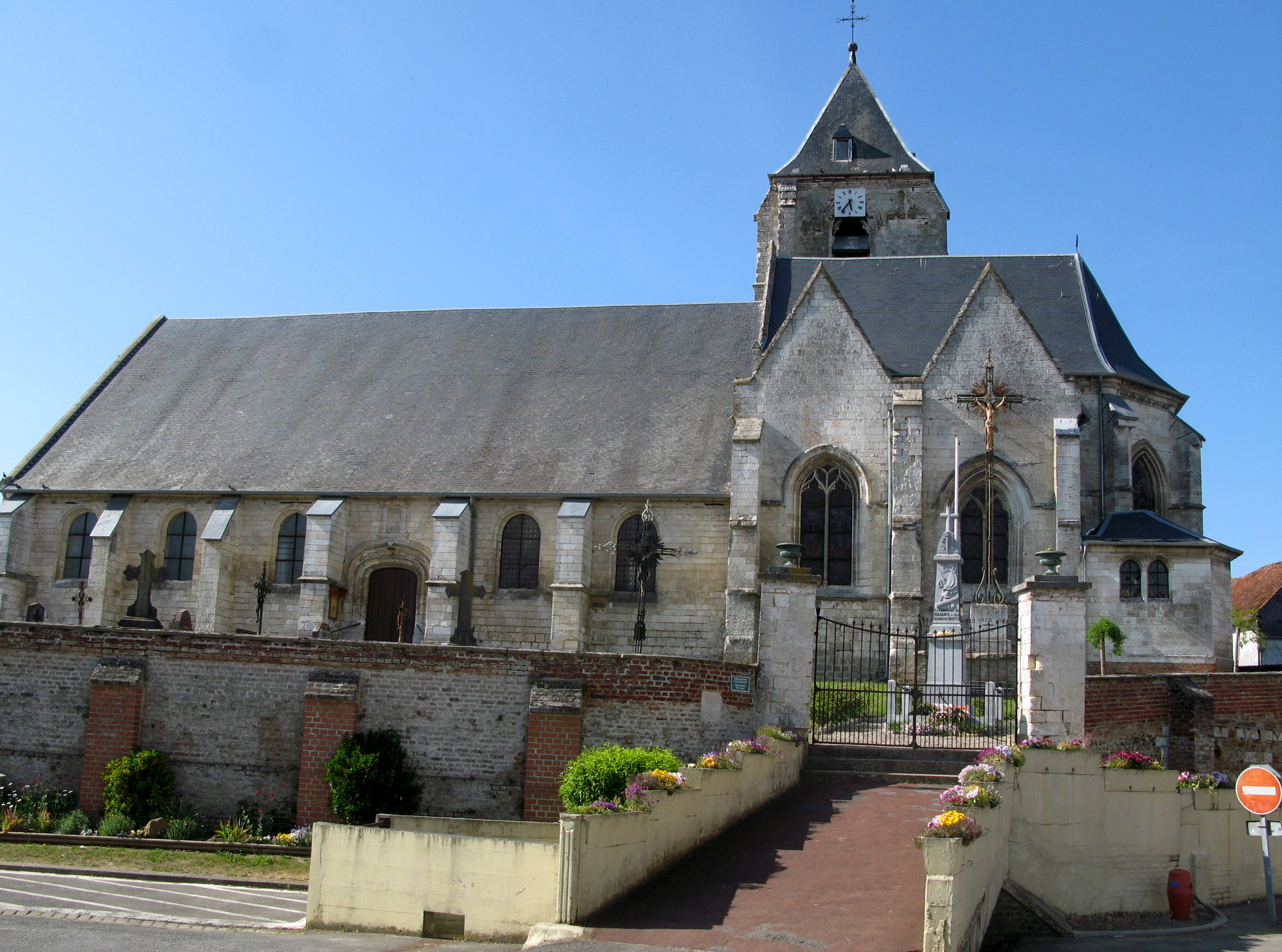 Naours (Somme, France) - L'église. .